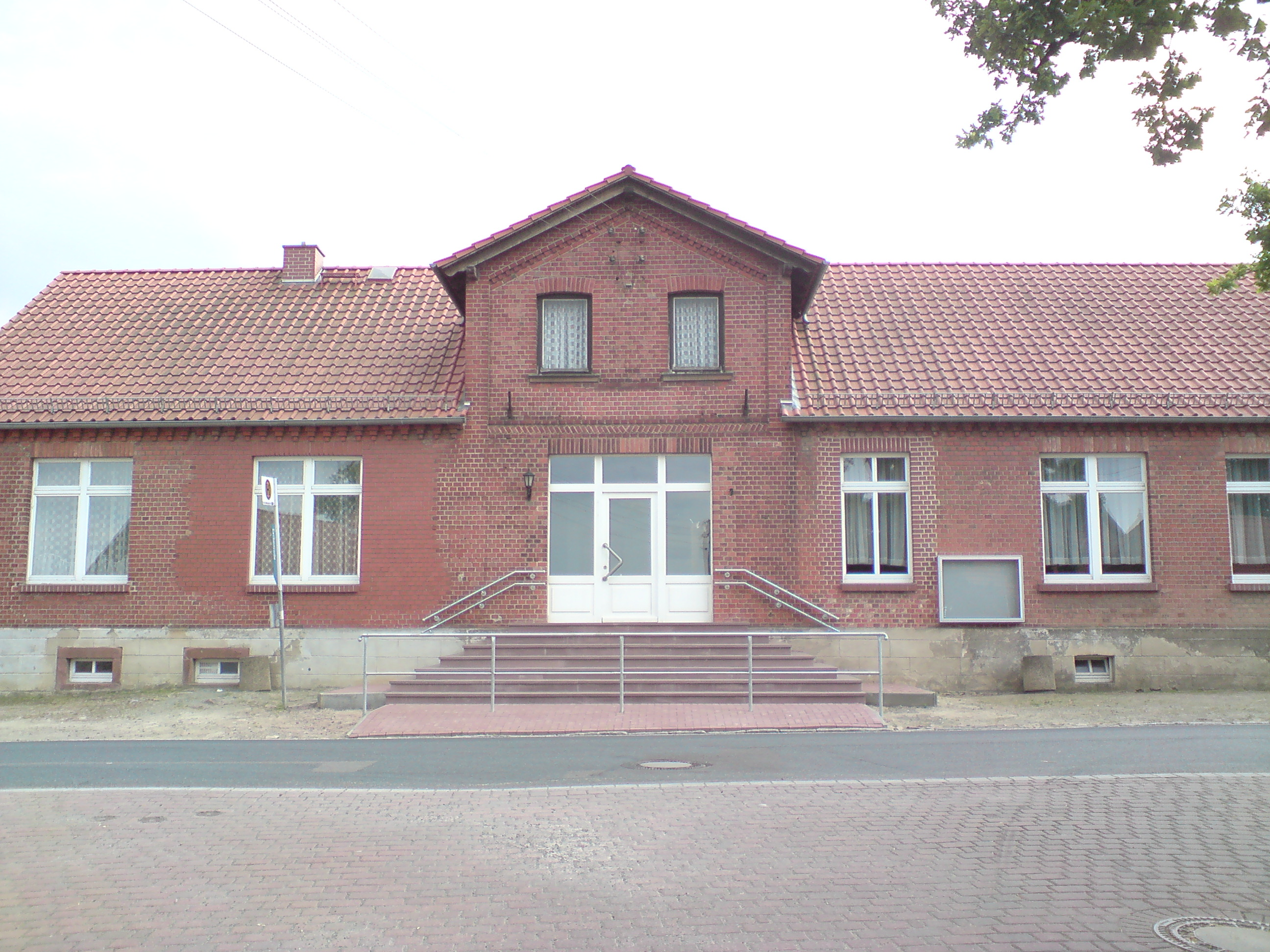 Eschenrode